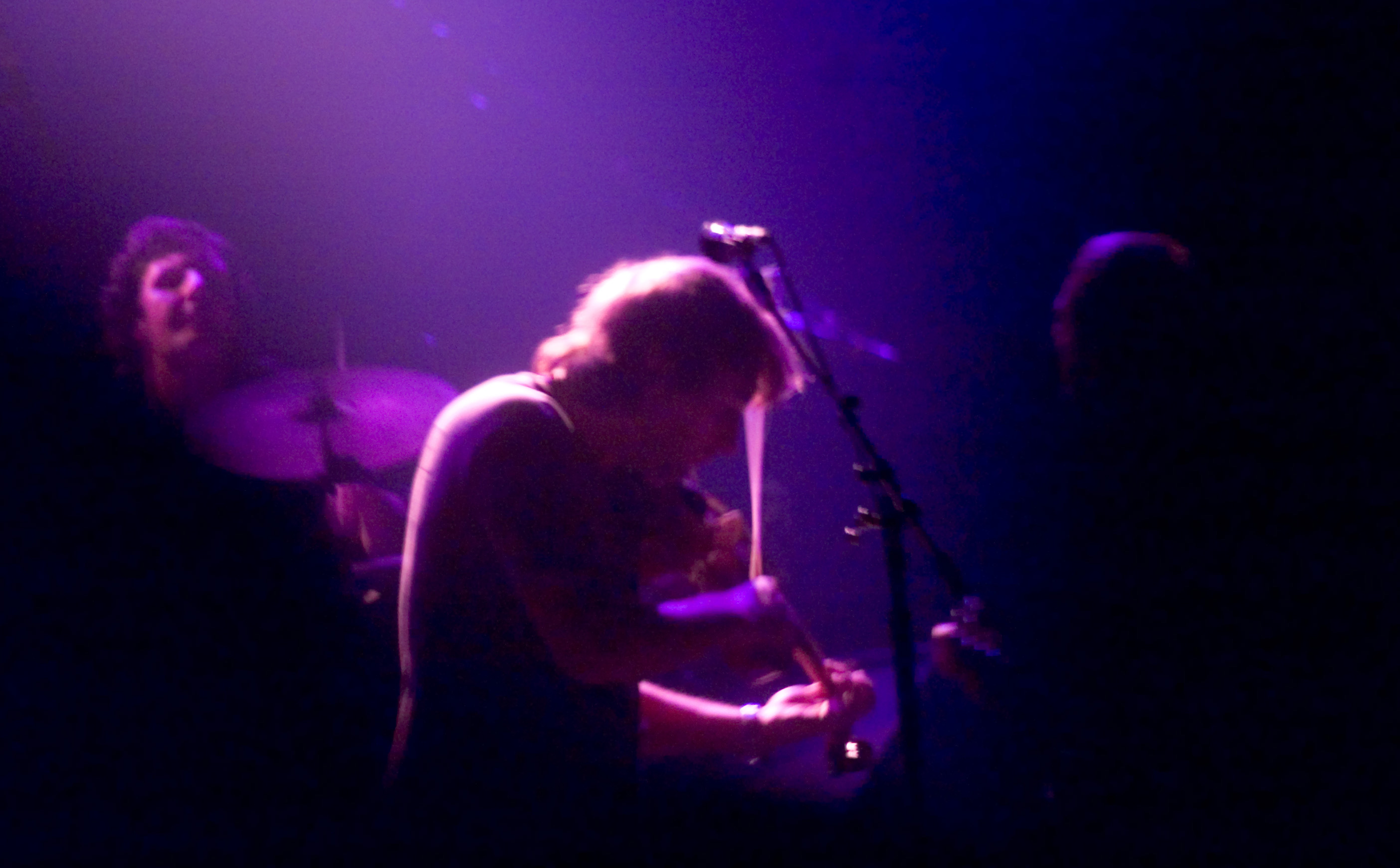 Yann Tiersen en concert le 25 novembre 2005 à Fri-son, Fribourg, Suisse.